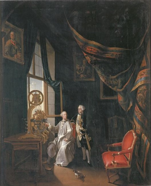 Doppelportrait Kurfürst Max III. Joseph von Bayern mit Graf Joseph von Salern im Drechselkabinett